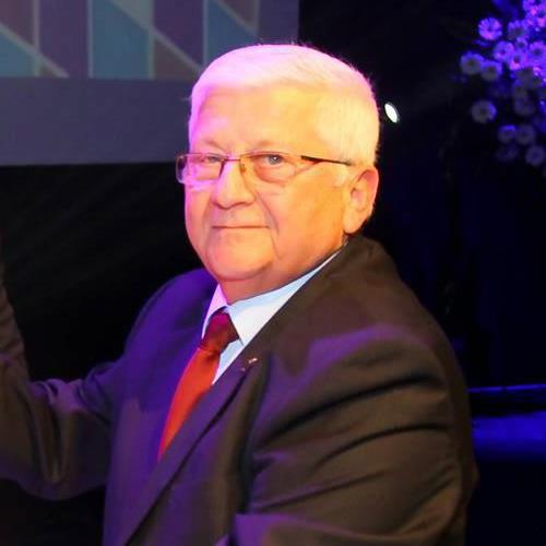 דב פ.תמיר